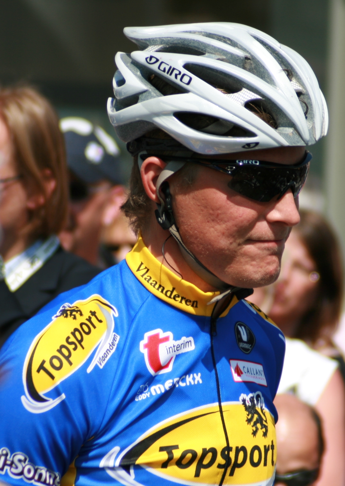 Kurt Hovelijnck aux Quatre jours de Dunkerque 2008